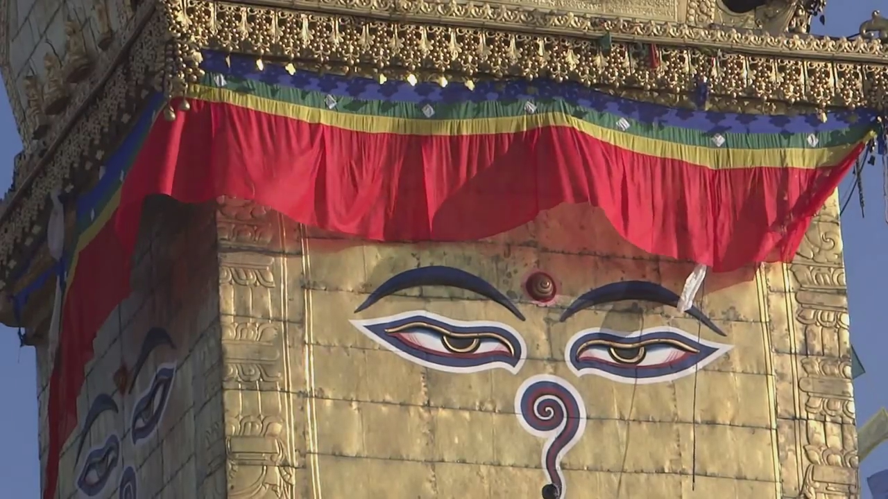 Photo animée HD Le temple bouddhique de Swayambhunath (appelé également Temple des singes en raison des macaques rhésus qui y vivent) est un site classé au patrimoine mondial de l'UNESCO. Il domine la ville de Katmandou et il est célèbre pour son grand stupa dont le bloc cubique qui soutient la flèche est orné du regard du Bouddha sur chacune de ses faces. Le signe à l'emplacement du nez est le chiffre Un (Ek) en népali, qui est le symbole de l'unité de toute vie. Entre les yeux, le troisième oeil représente la clairvoyance du Bouddha.